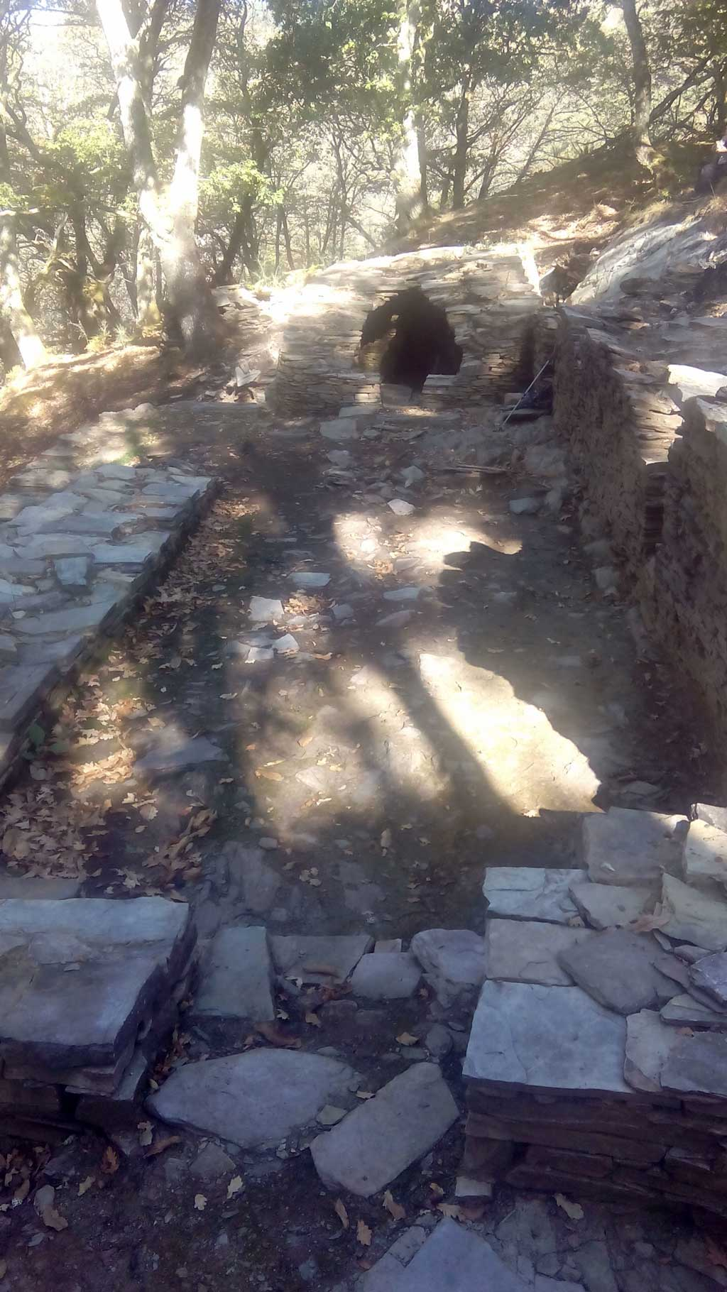 Vista da sauna do castro de Castañoso.